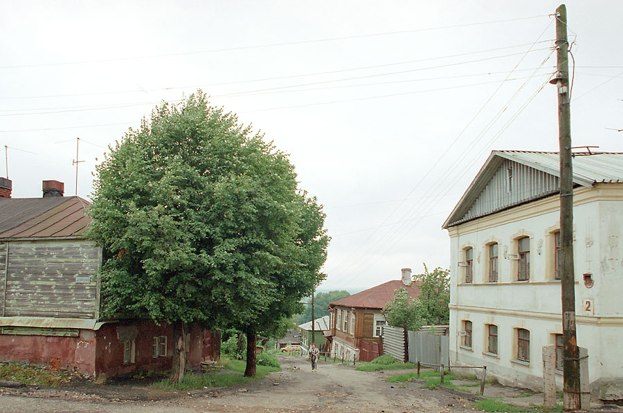 Vladimir, Russia, 2002